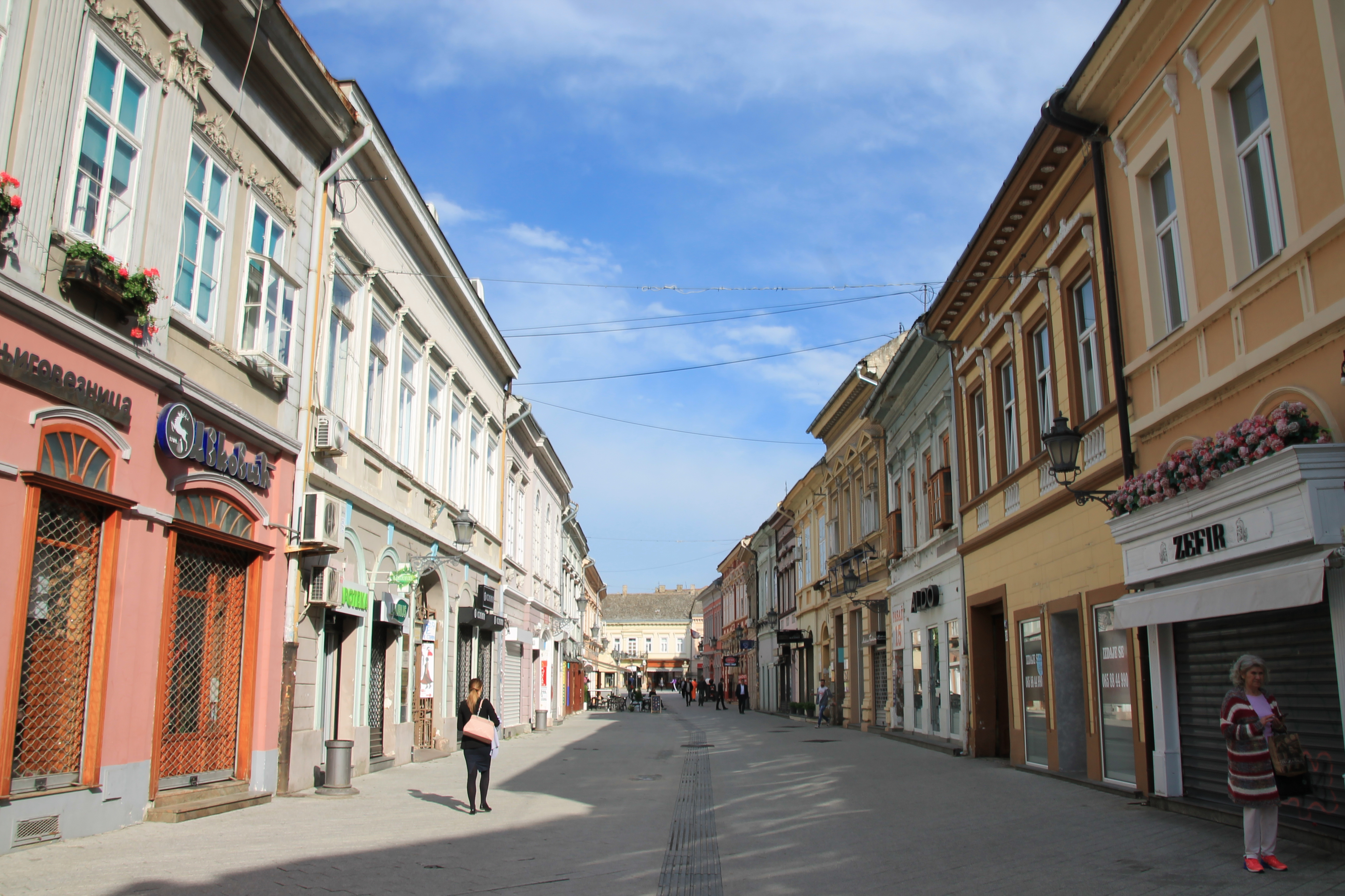 Dunavska (Novi Sad)